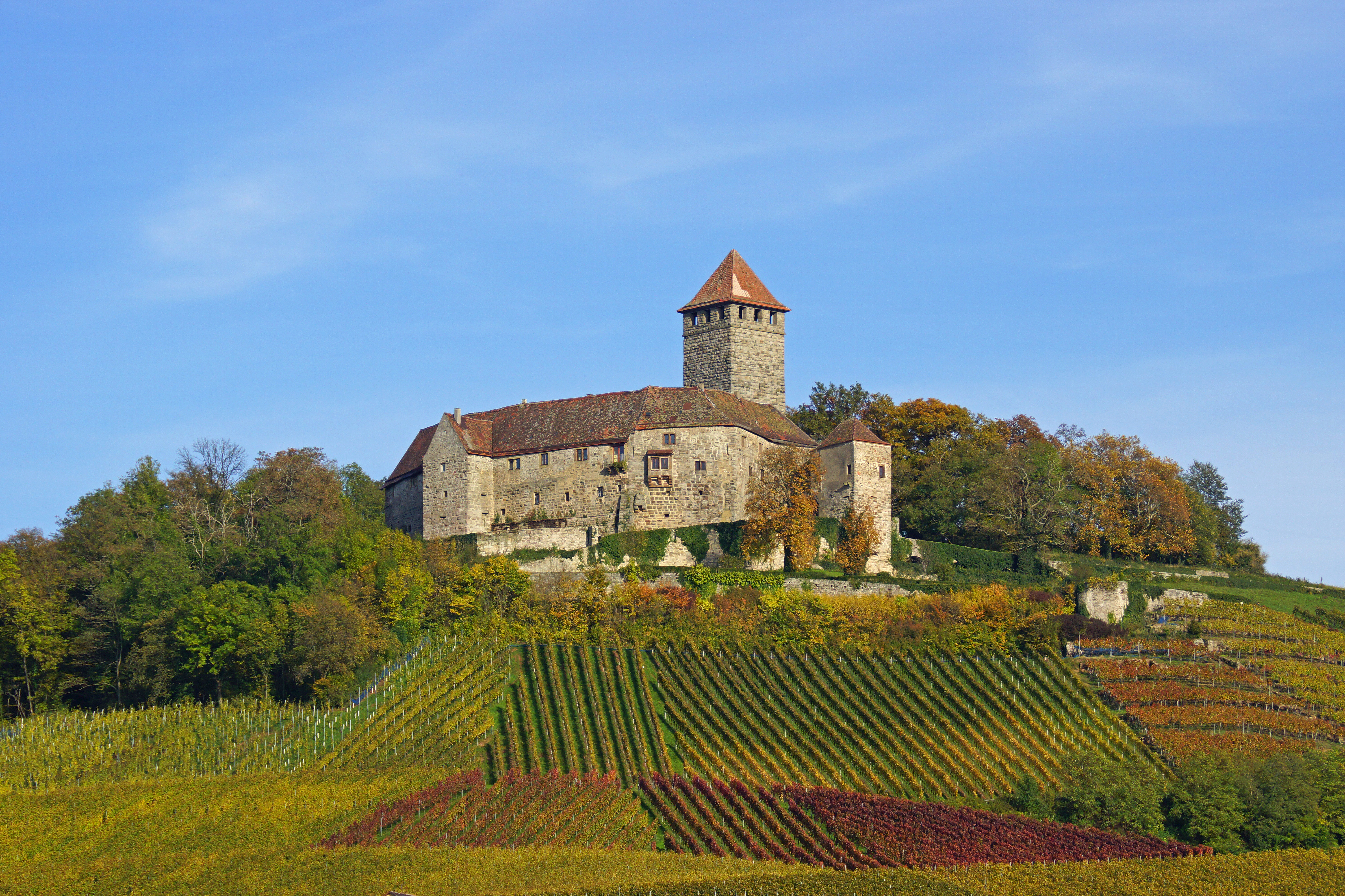 Großbottwar, Burg Lichtenberg 11/2014